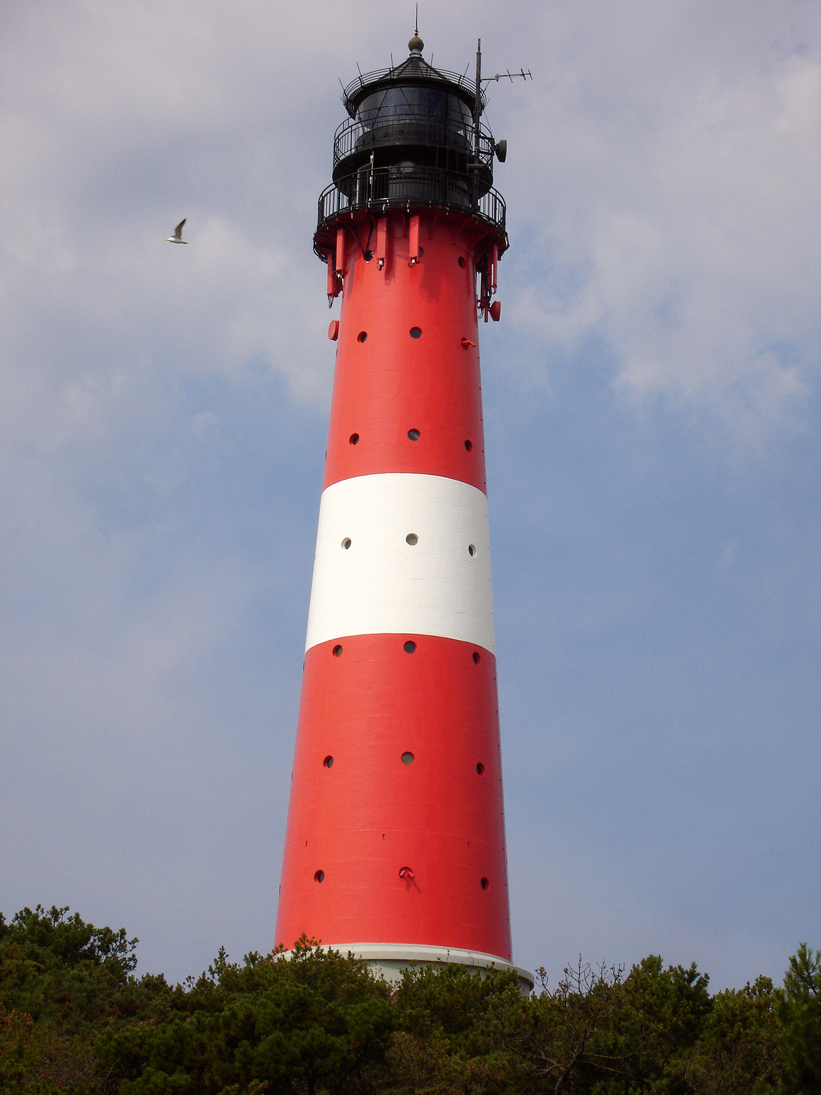 Leuchtturm in Hörnum/Sylt/Germany